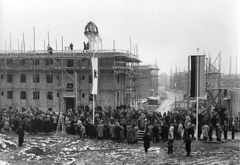 Richtfest des Notaufnahmelagers für 2000 politische Flüchtlinge aus der Sowjetzone in Marienfelde (Berlin)